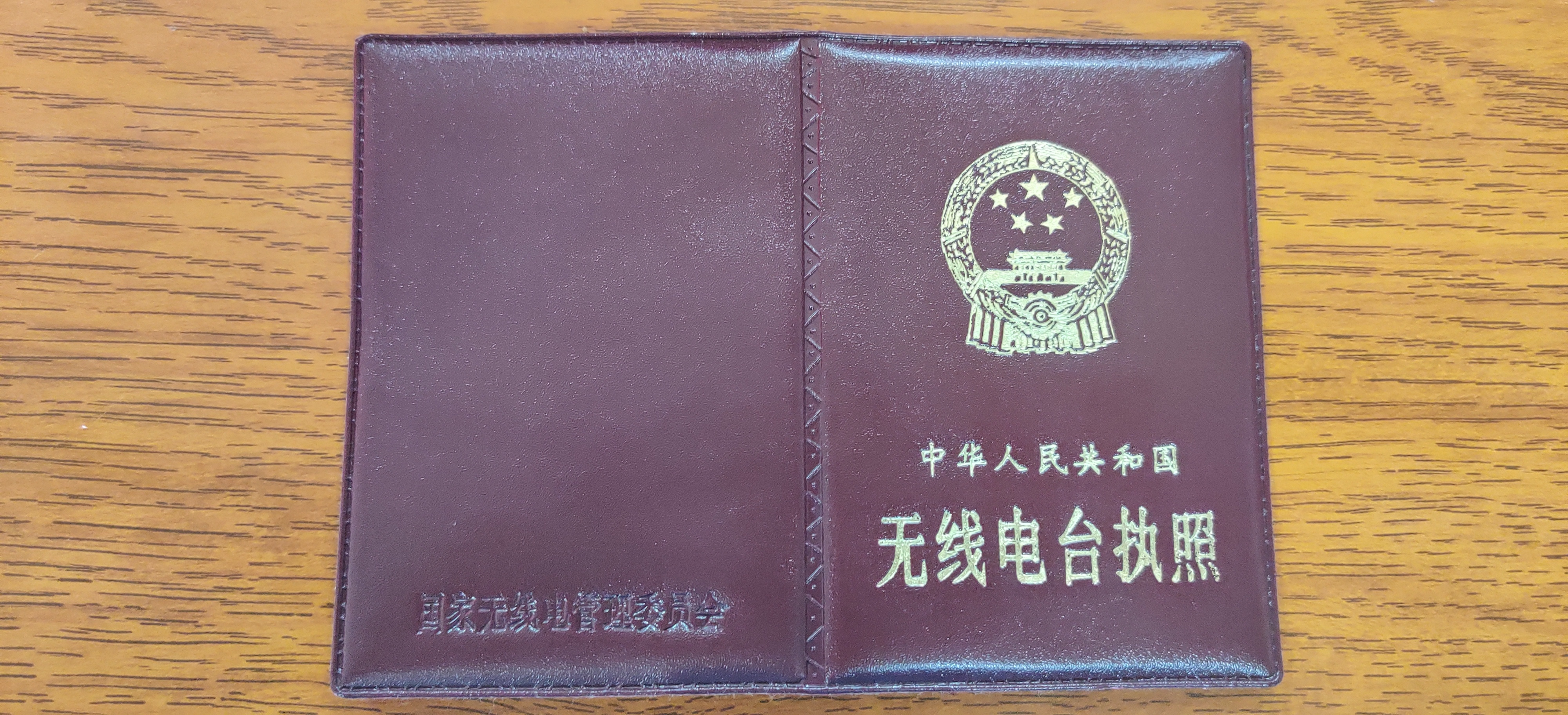 中文（中国大陆）: 老式中华人民共和国无线电台执照壳，新办理执照除非还有余存否则已不再提供此样式执照壳